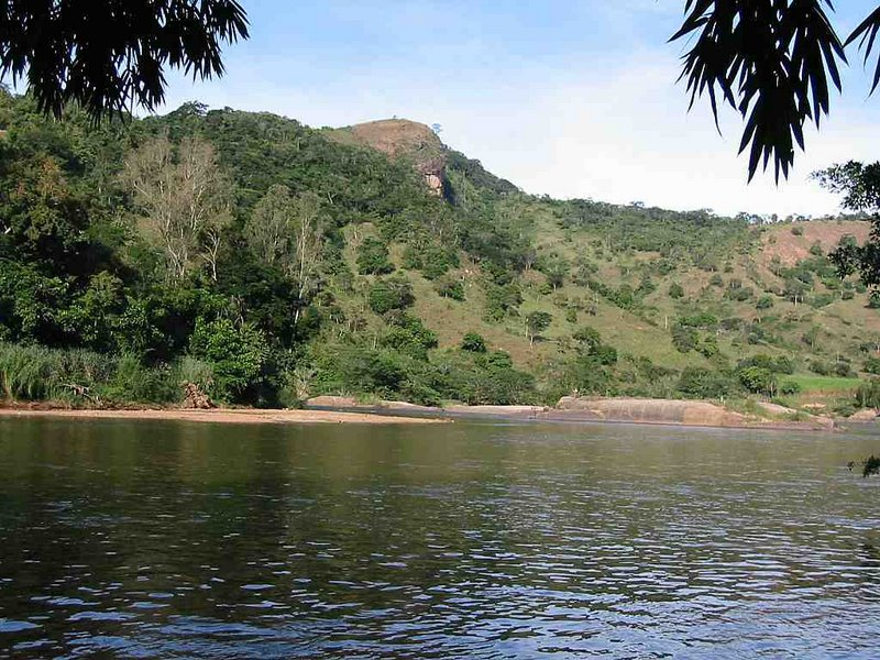 Pedrão